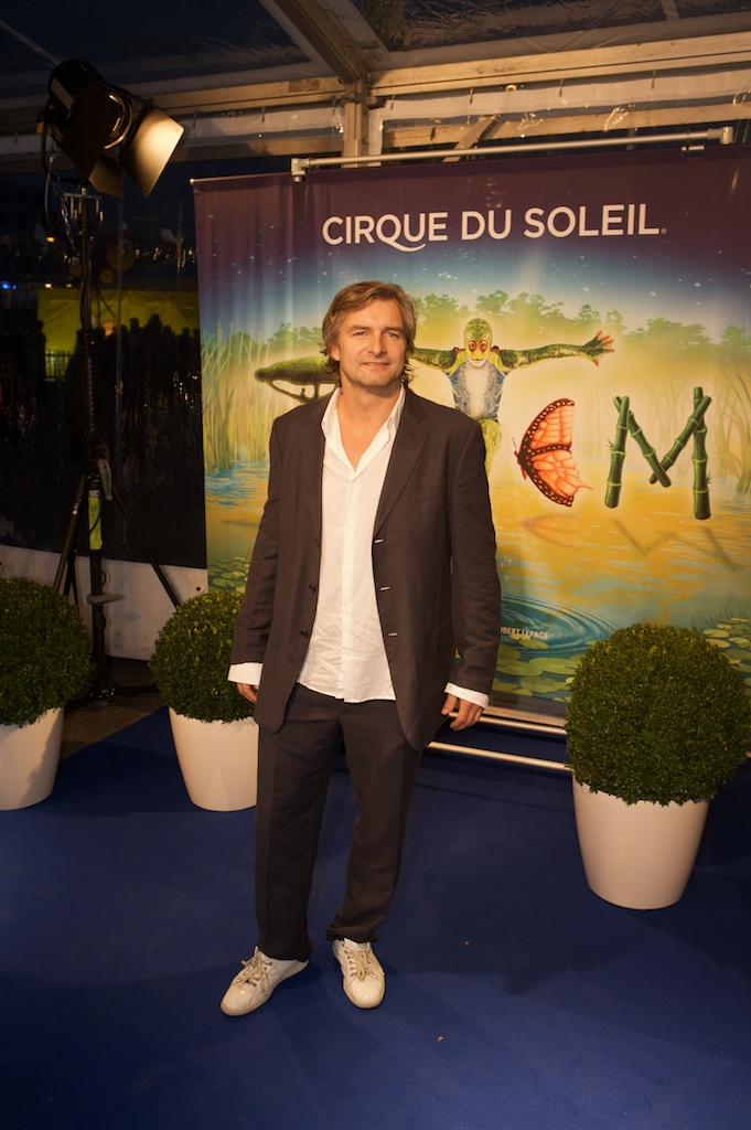 Victor Reinier bij de Europese première Cirque du Soleil in Amsterdam